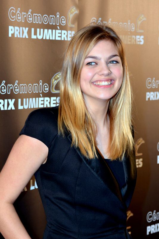 Louane Emera à la cérémonie des prix Lumières